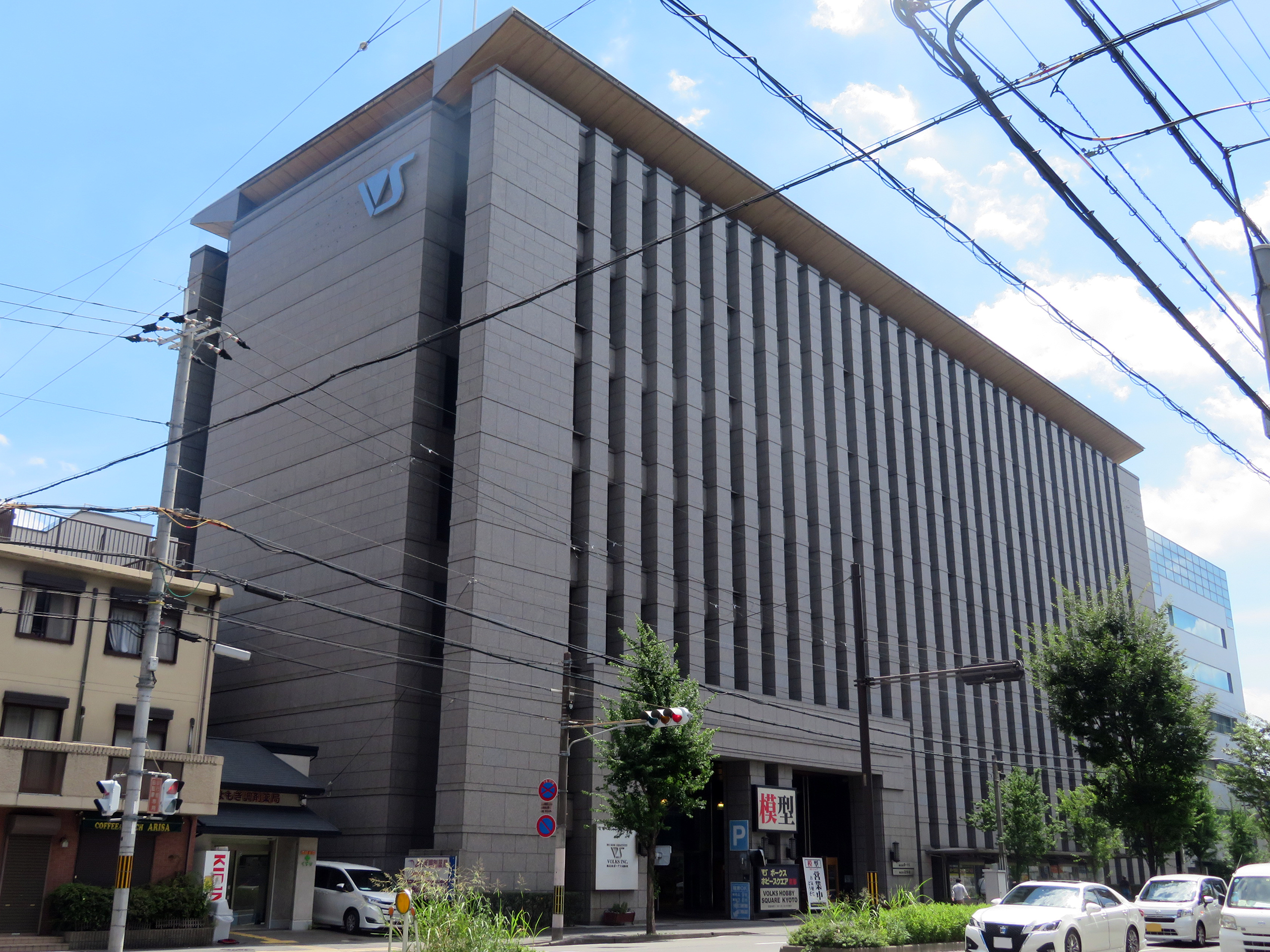 株式会社ボークス本社を撮影。